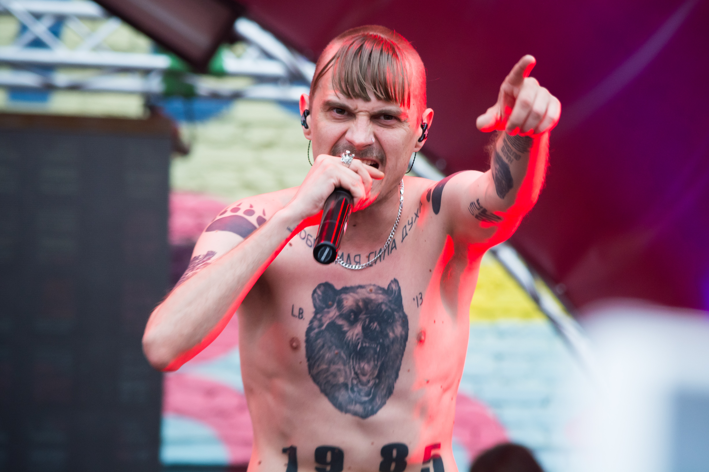 Илья Прусикин (группа Little Big) на Видфест 2016 в Санкт-Петербурге